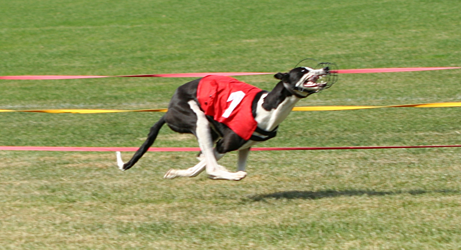 Chart angielski Greyhound podczas torowych wyścigów chartów w Bytomiu-Szombierkach.